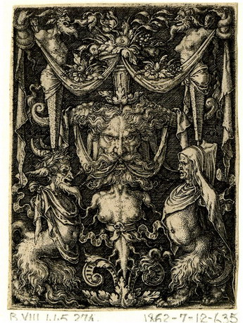 Heіnrich Aldegrever capricci 003.jpg